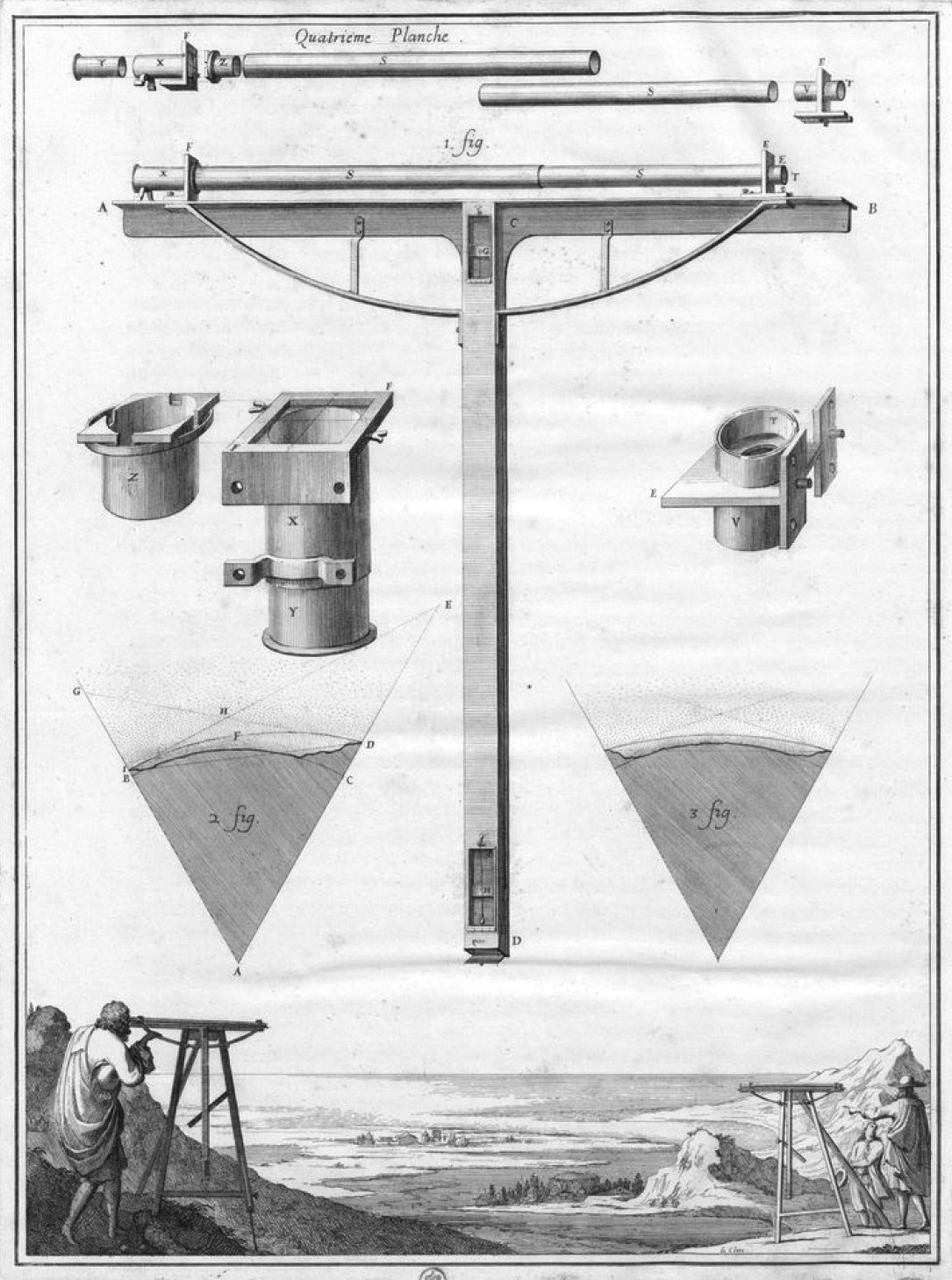 Le niveau de Picard dans La mesure de la Terre.